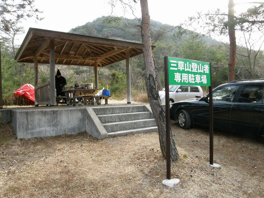 三草山昭和池登山口